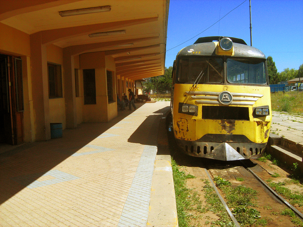 Ferrocarril del ramal Talca-Constitución. Estación Constitución Railway Talca-Constitución (Chile). Constitución train station